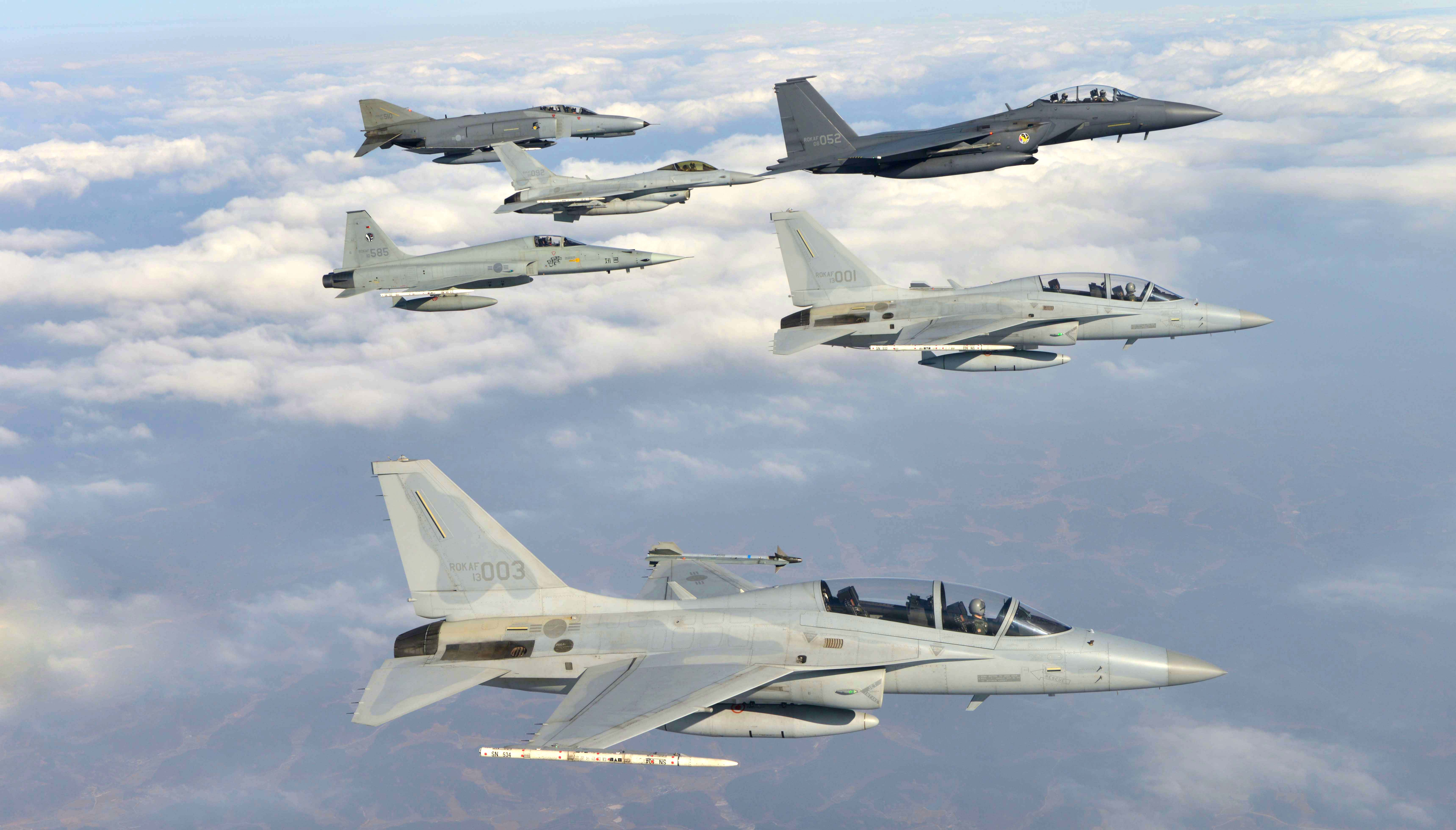 공군은 지난 2월 2일(월)부터 2주에 걸쳐 대규모 전역급 종합전투훈련인 '소링 이글(Soaring Eagle) 훈련'을 실시하고 있다. 사진은 2월 5일(목) 임무에 나선 공격 편대군 전투기들의 모습. 이번 훈련에 처음으로 참가한 국산전투기 FA-50이 F-15K, KF-16, F-4, F-5 전투기와 더불어 호흡을 맞추며 임무에 나서고 있다.